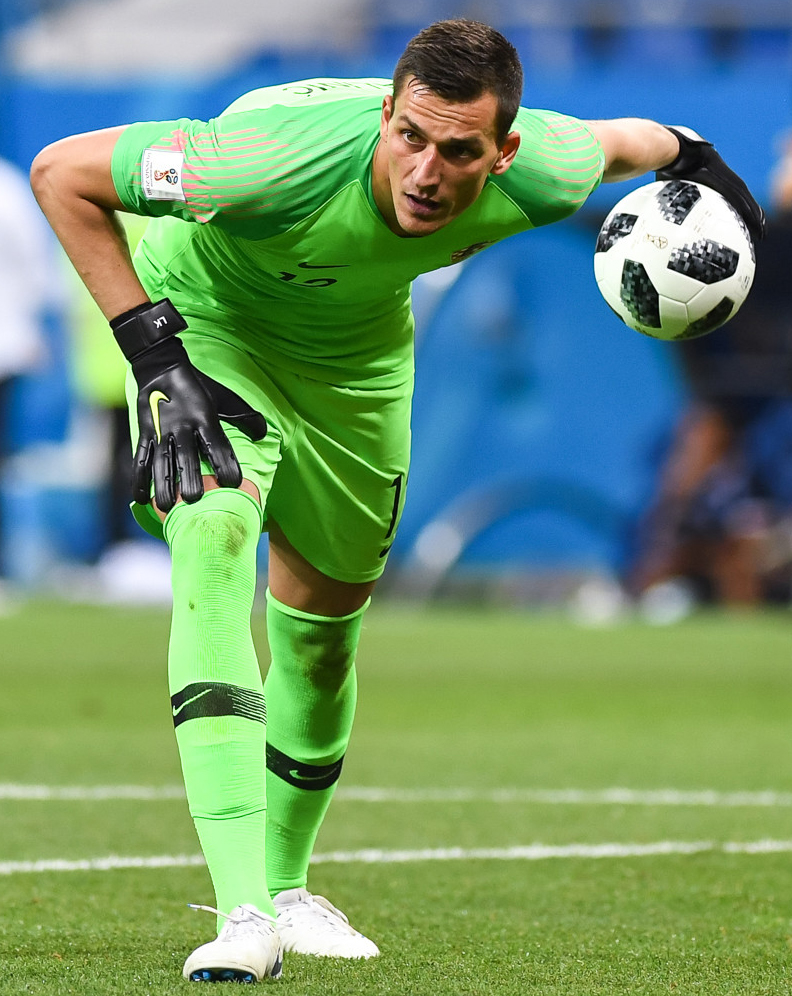 Сборная Исландии уступает Хорватии и покидает ЧМ-2018